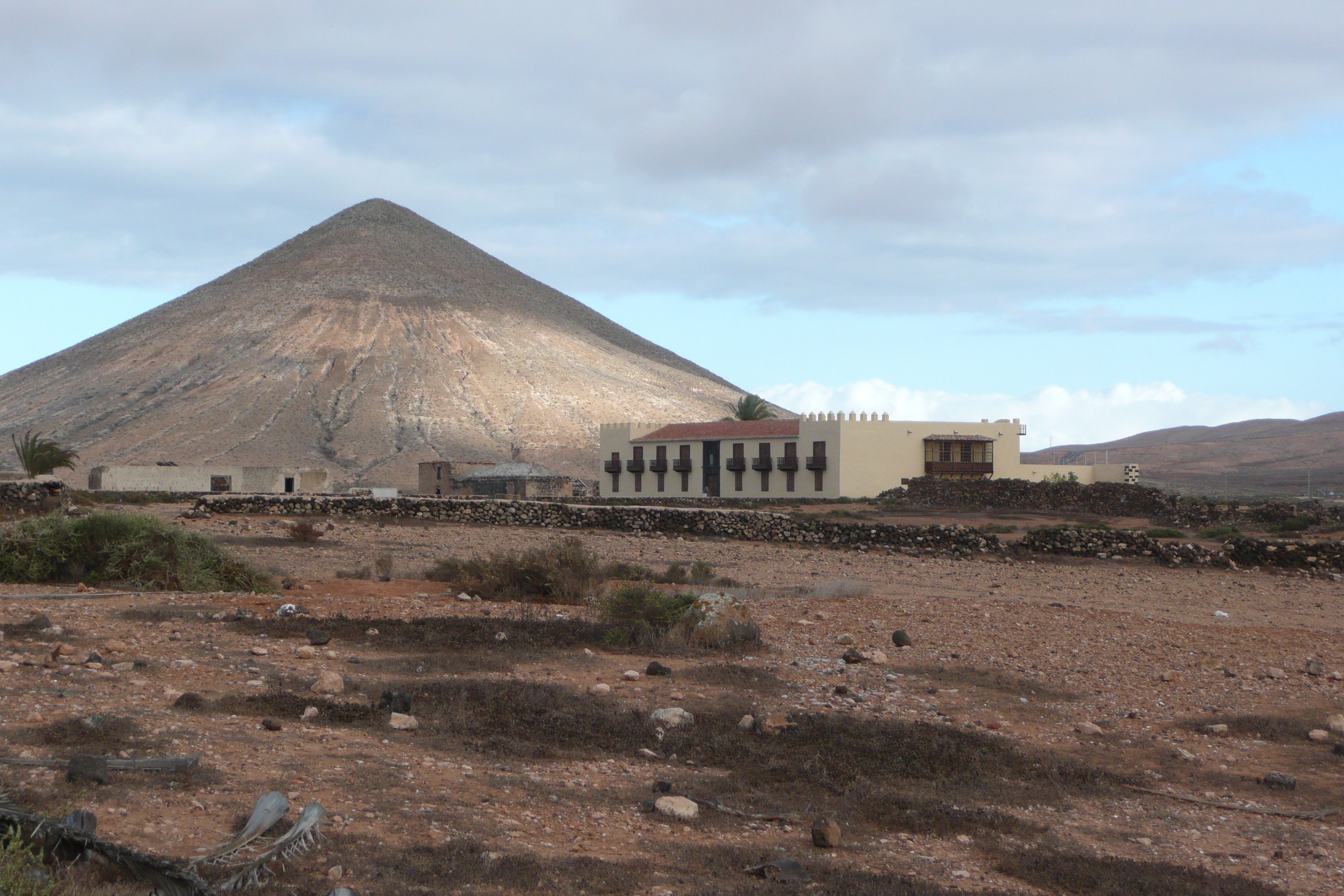 Die Casa del Coronel in La Oliva, Fuerteventura, Spanien